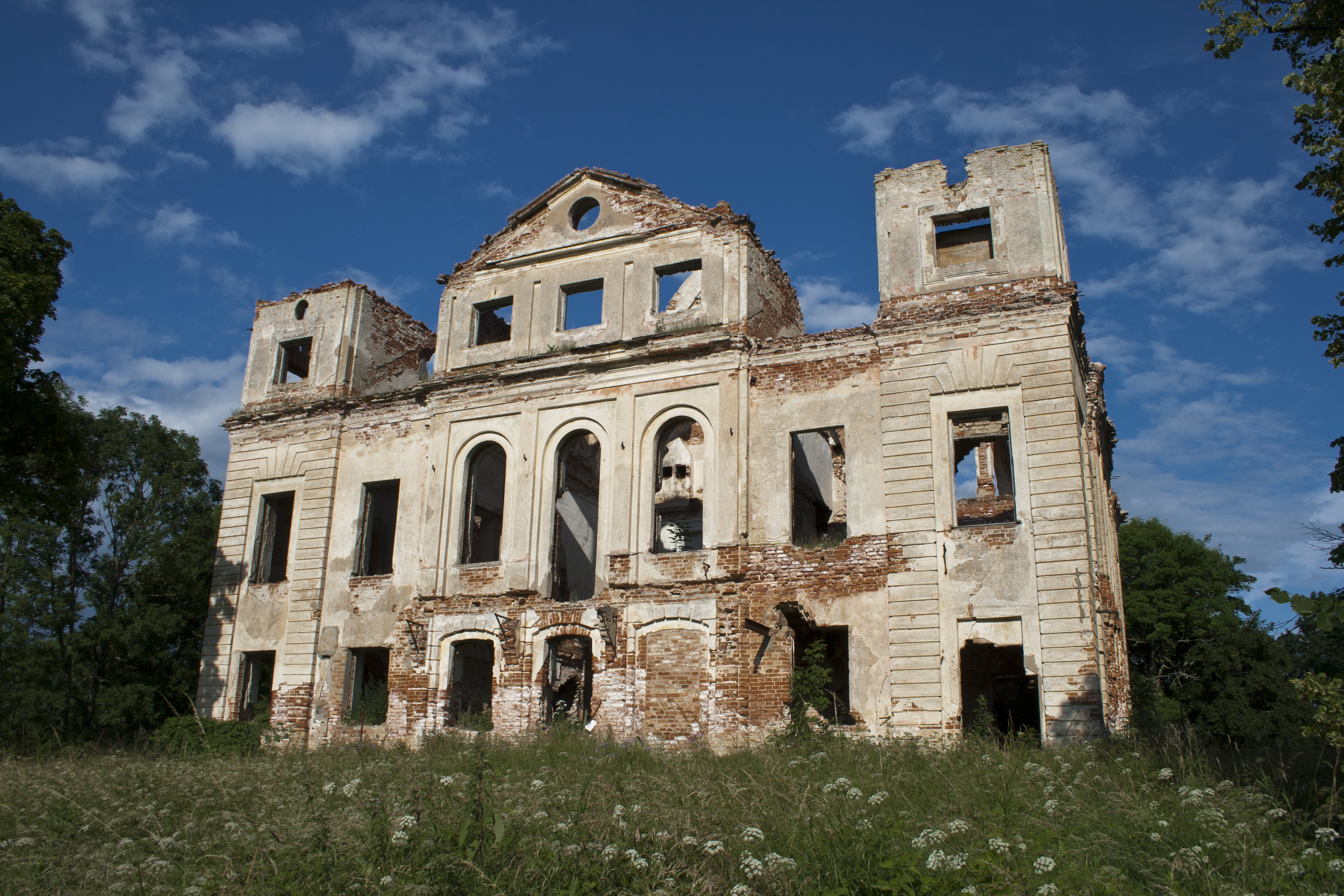 Lustes muižas pils, Jaunbērzes pagasts